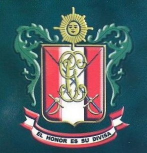 Emblema del Cuerpo Paramilitar de Policía Uniformada "Benemérita Guardia Civil y Policía" del Perú, Blasón institucional, ostentando el lema: "El Honor es su divisa", aprobado por Resolución Ministerial Nº 144 del 29 de diciembre de 1966. Su descripción heráldica: Escudo de tipo francés: rectangular, con los vértices inferiores redondeados y terminado en punta. Campo terciado en palo, palo en plata y los tercios diestro y siniestro en gules. Monograma institucional en palo, con las letras GC entrelazadas, estilizadas y en oro y sobre dos floretes, en oro, desenvainados y dispuestos en la forma de una cruz de San Andrés. Bordura en oro; timbrado con un sol radiante, en oro, como cimera y del cual penden dos lambrequines en sinople y ubicados en la diestra y en la siniestra. Debajo del escudo hay una orla semicircular, con bordura en sable y terciada en faja, con faja en plata y con las partes superior e inferior en gules, mostrado en la faja el mote: “El honor es su divisa” con letras en sable.